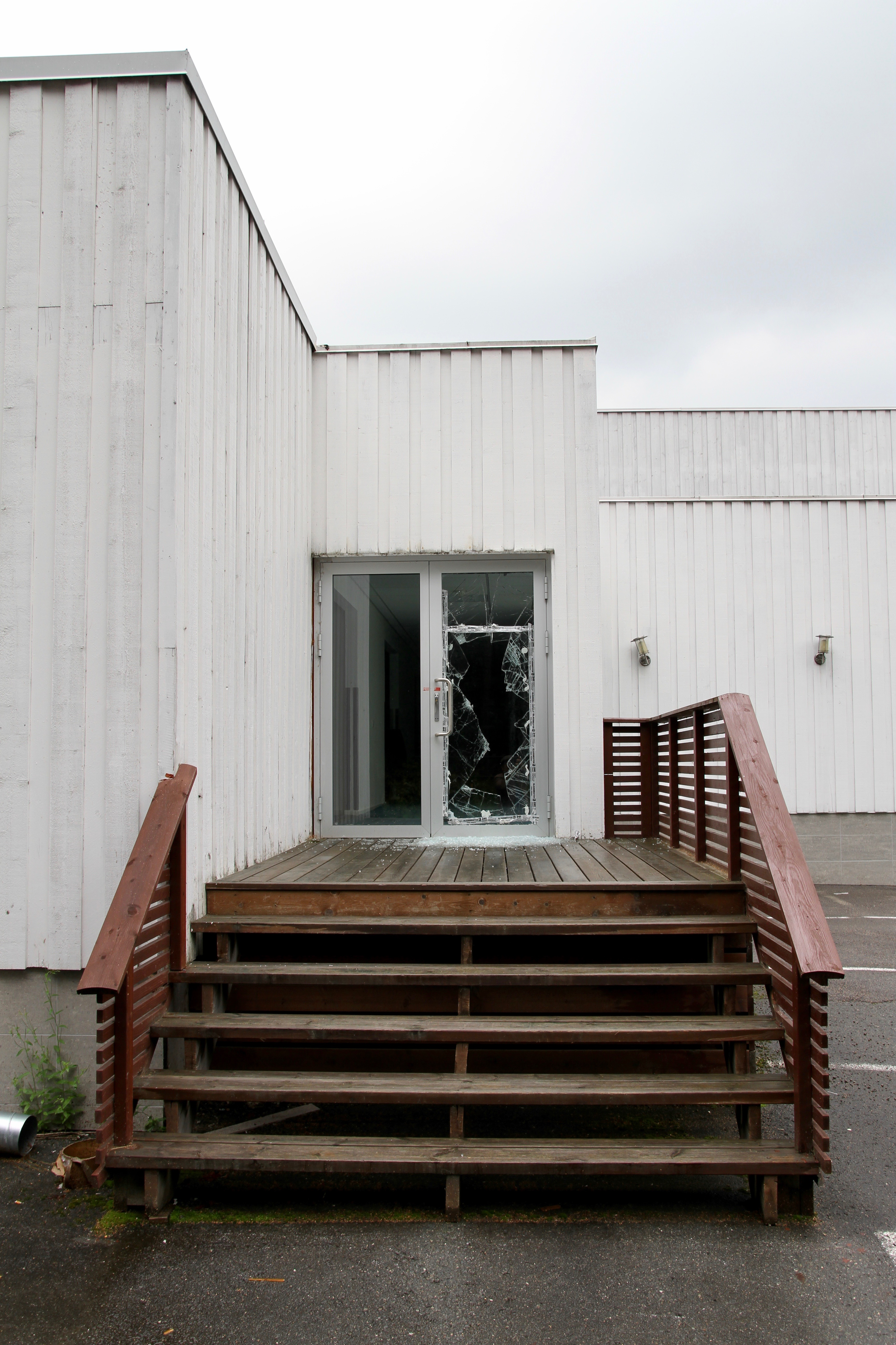 Al-Noor Islamic Centre i Bærum. Dette er døra Philip Manshaus skjøt seg igjennom for å komme inn i bygningen.